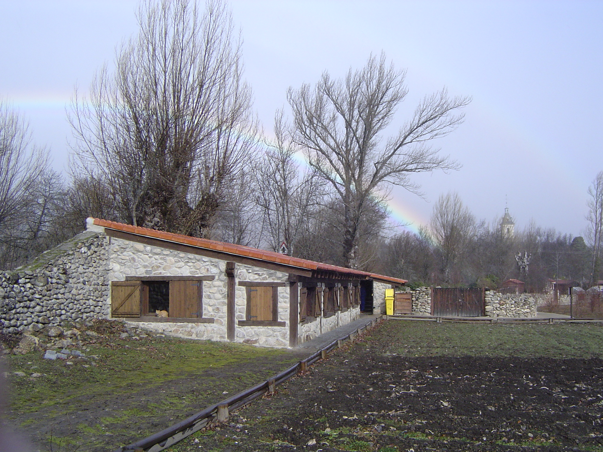 Aula del CV Puente del Perdón